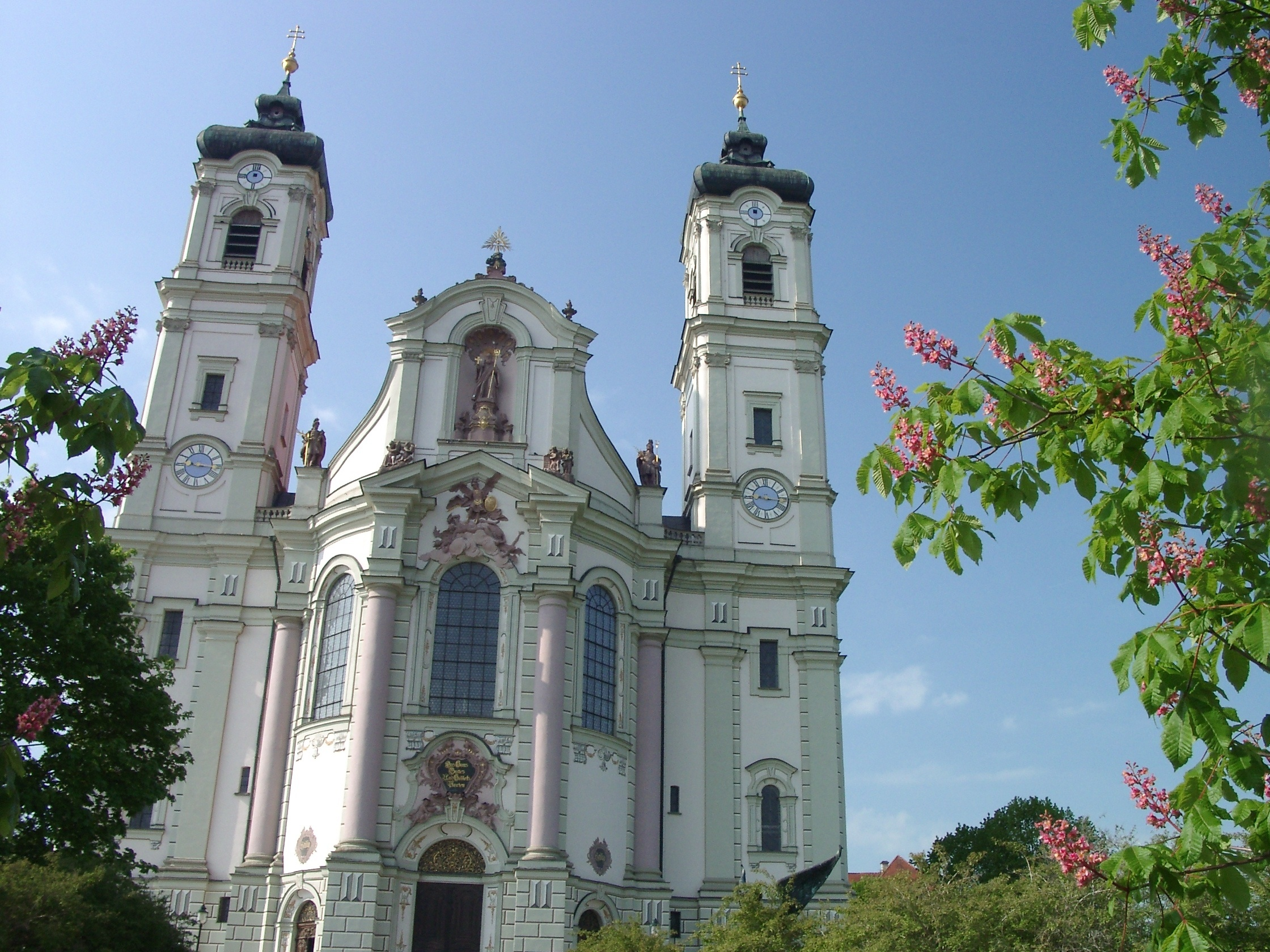 Fassade der spätbarocken Basilika in Ottobeuren. Erbaut von 1737-1766 von Simpert Kramer (bis 1748) und Johann Michael Fischer.